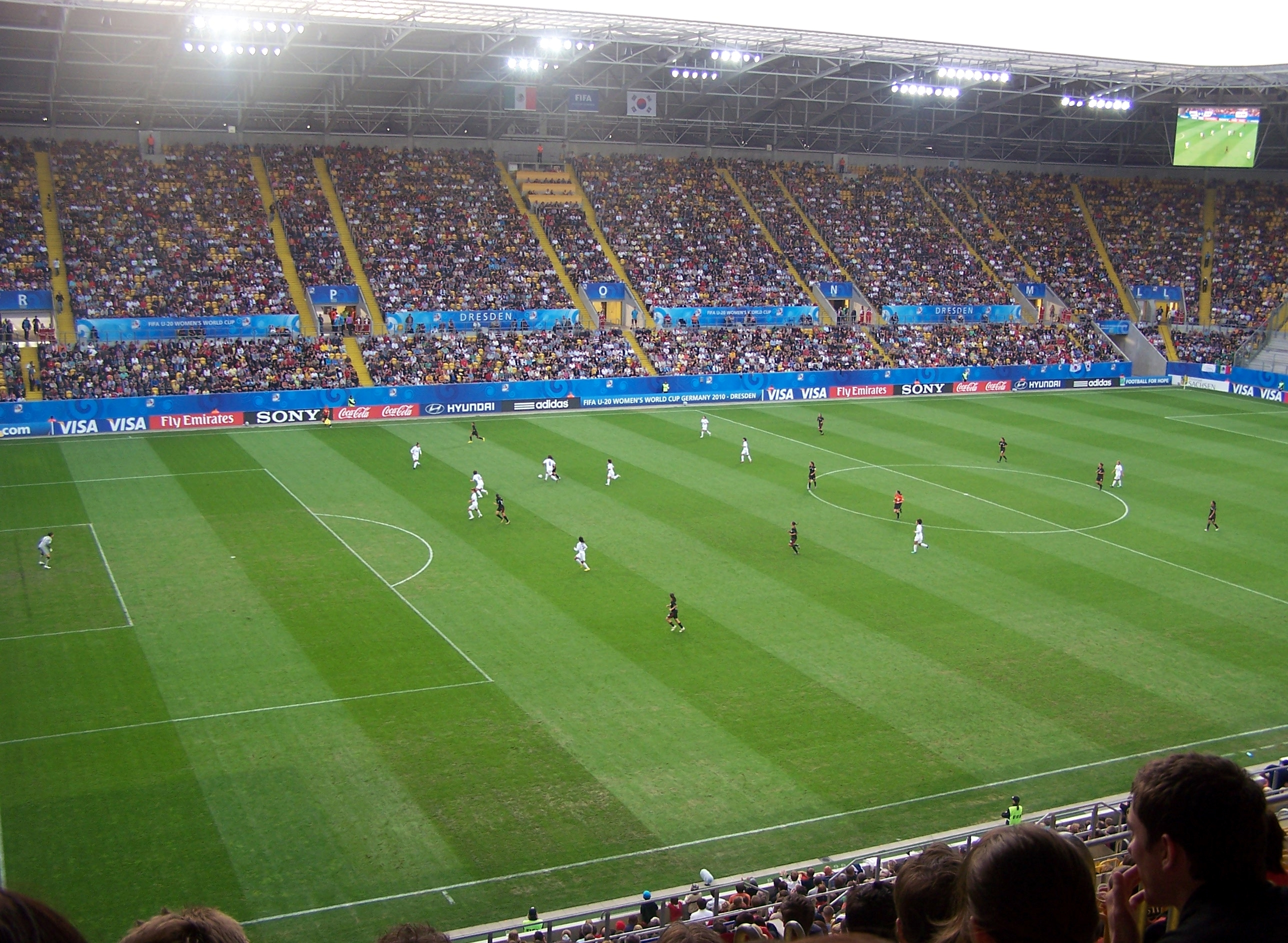 Viertelfinale Südkorea-Mexiko der U-20-WM der Frauen 2010 in Dresden, Rudolf-Harbig-Stadion, 25.07.2010